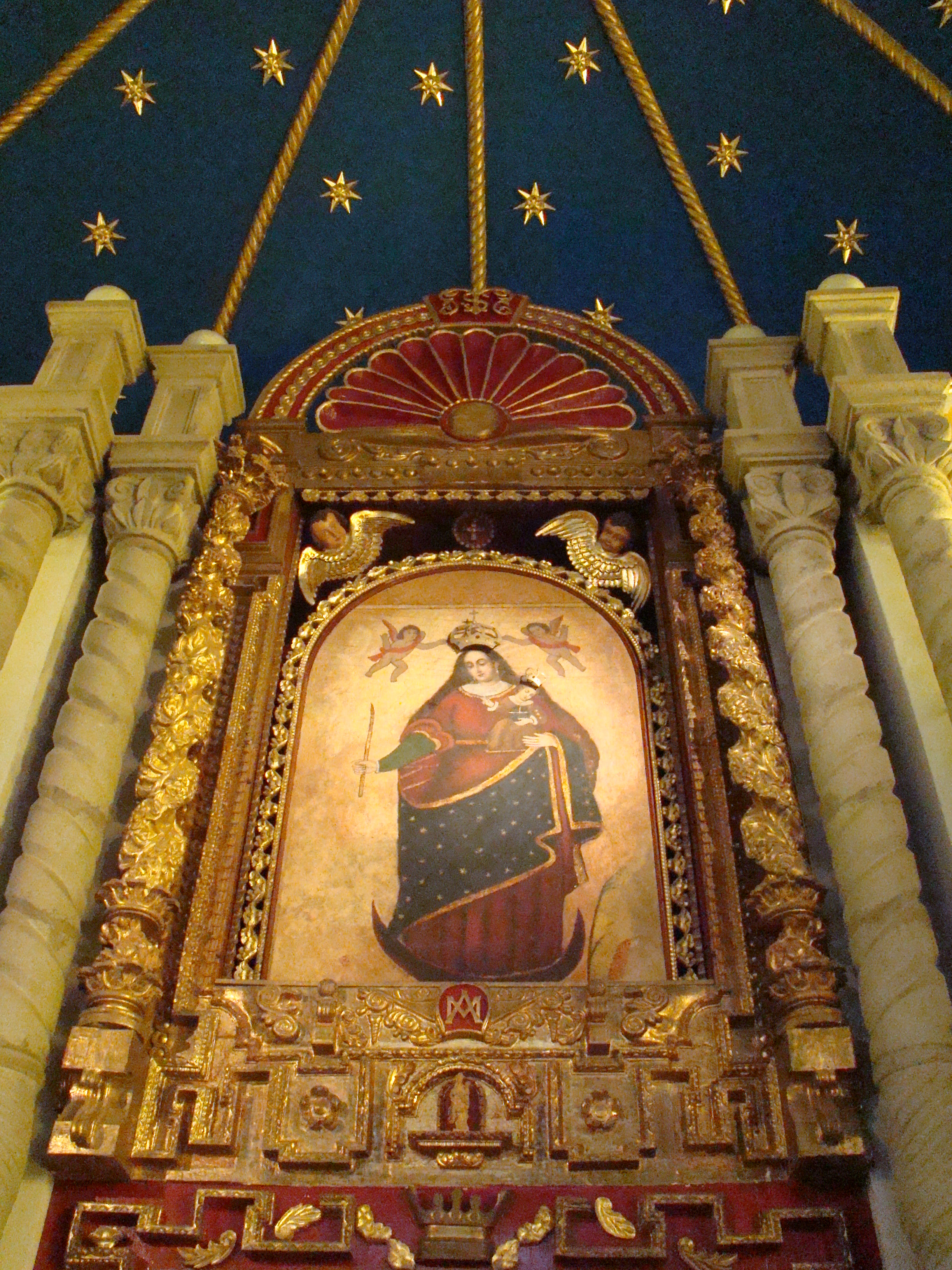 Fresco pintado el Siglo XVI, en un muro de ingreso al "Socavón" de la Villa colonial de Oruro, el culto y devoción a la imágen, ha generado el famoso Carnaval de Oruro, miles de danzarines que bailan devotamente. Este fenómeno cultural se ha expandido como parte de la "imitación extralógica" a otros poblados como La Paz, Cochabamba, Potosí en Bolivia, Puno en Perú y La Serena y La Tirana en Chile